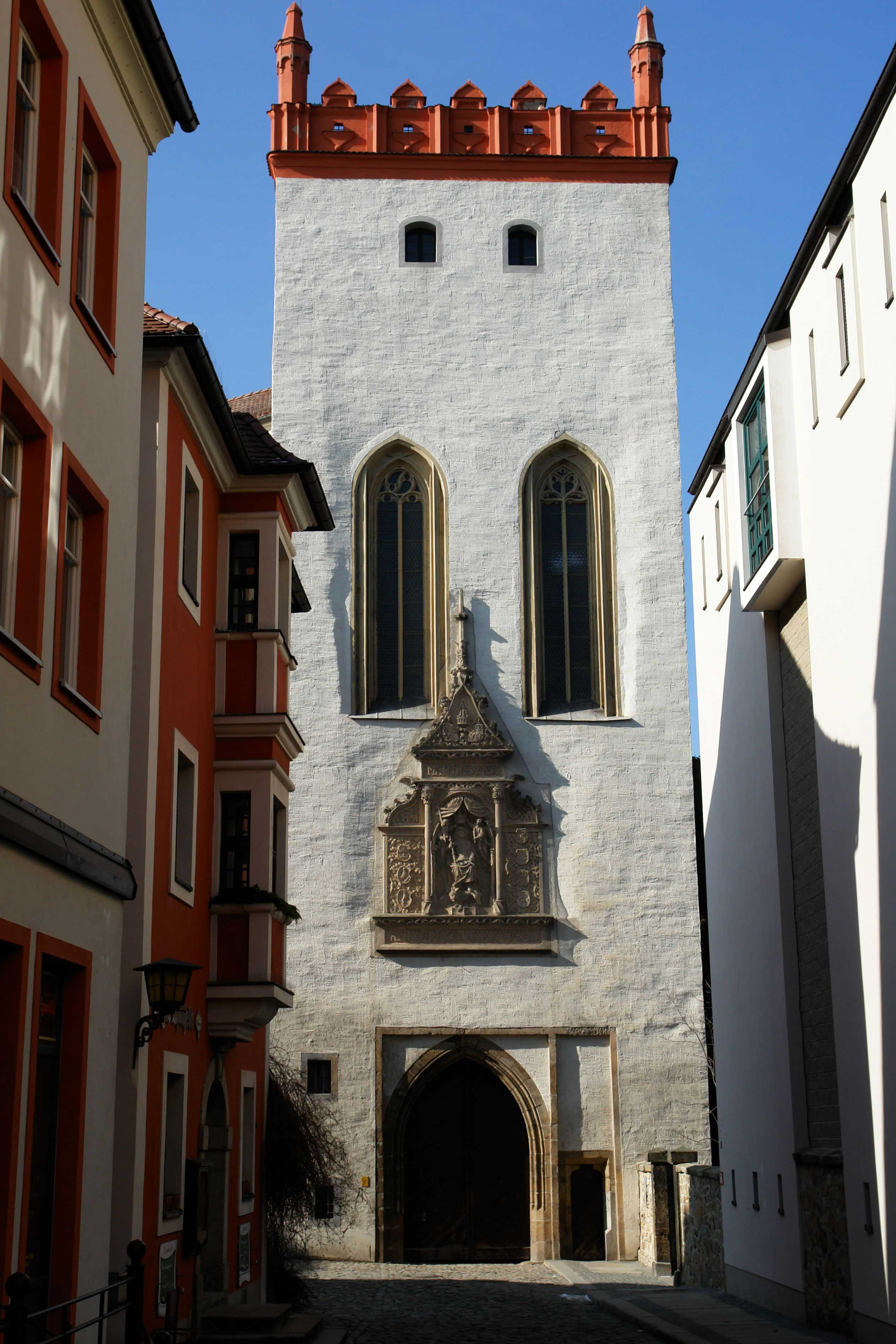 Der Matthiasturm der Ortenburg in Bautzen. Hornjoserbsce: Maćijowa wěža na Hrodowskej w Budyšinje.